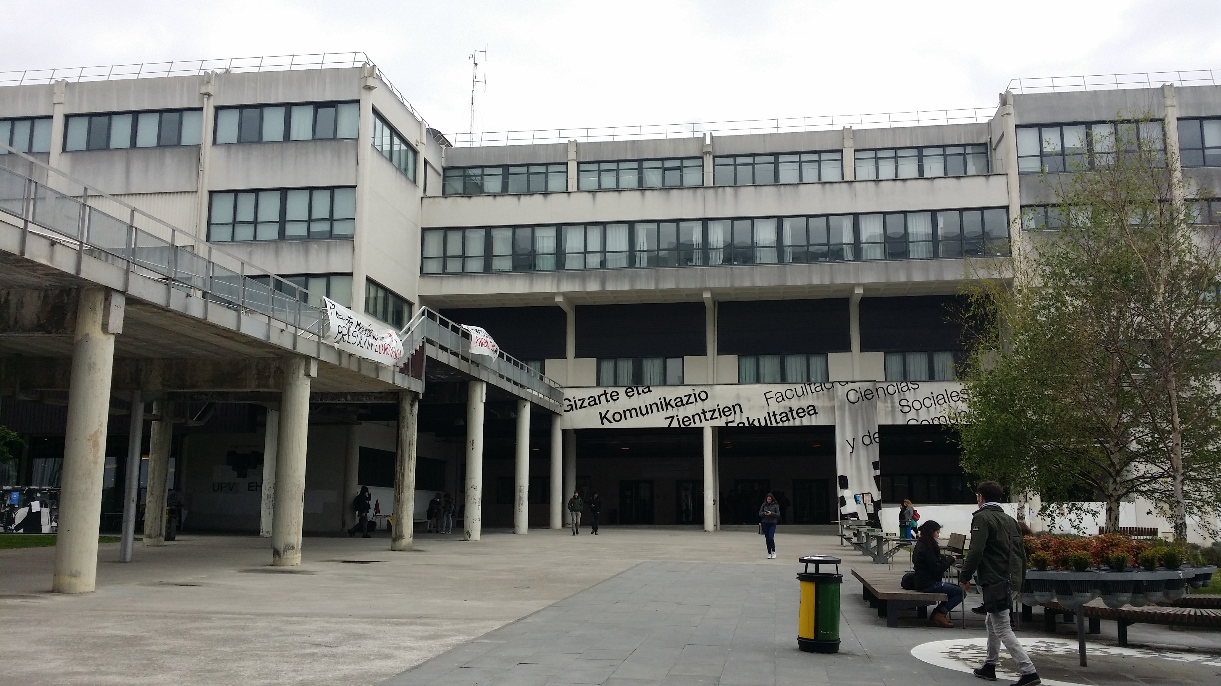 Leioako Campuseko Gizarte eta Komunikazio Zientzien Fakultatea. 2016.